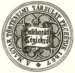 A Magyar Történelmi Társulat/Hungarian Historical Society pecsétje